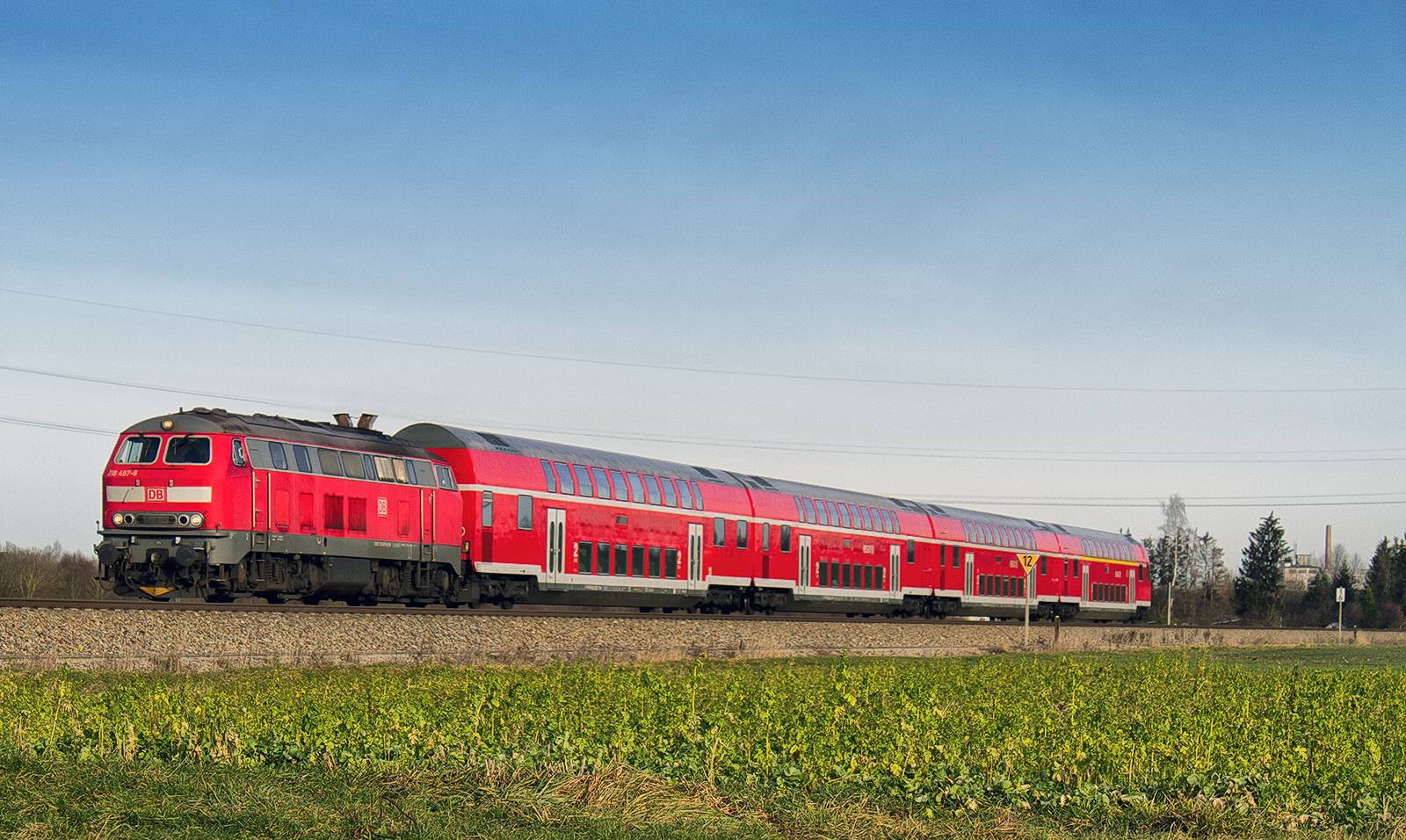 BR218 RegioDB Munich-Füssen